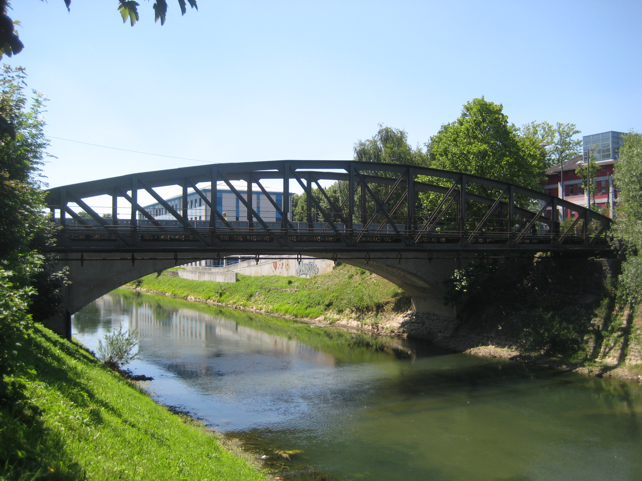 železniški most Moste - Ljubljanica